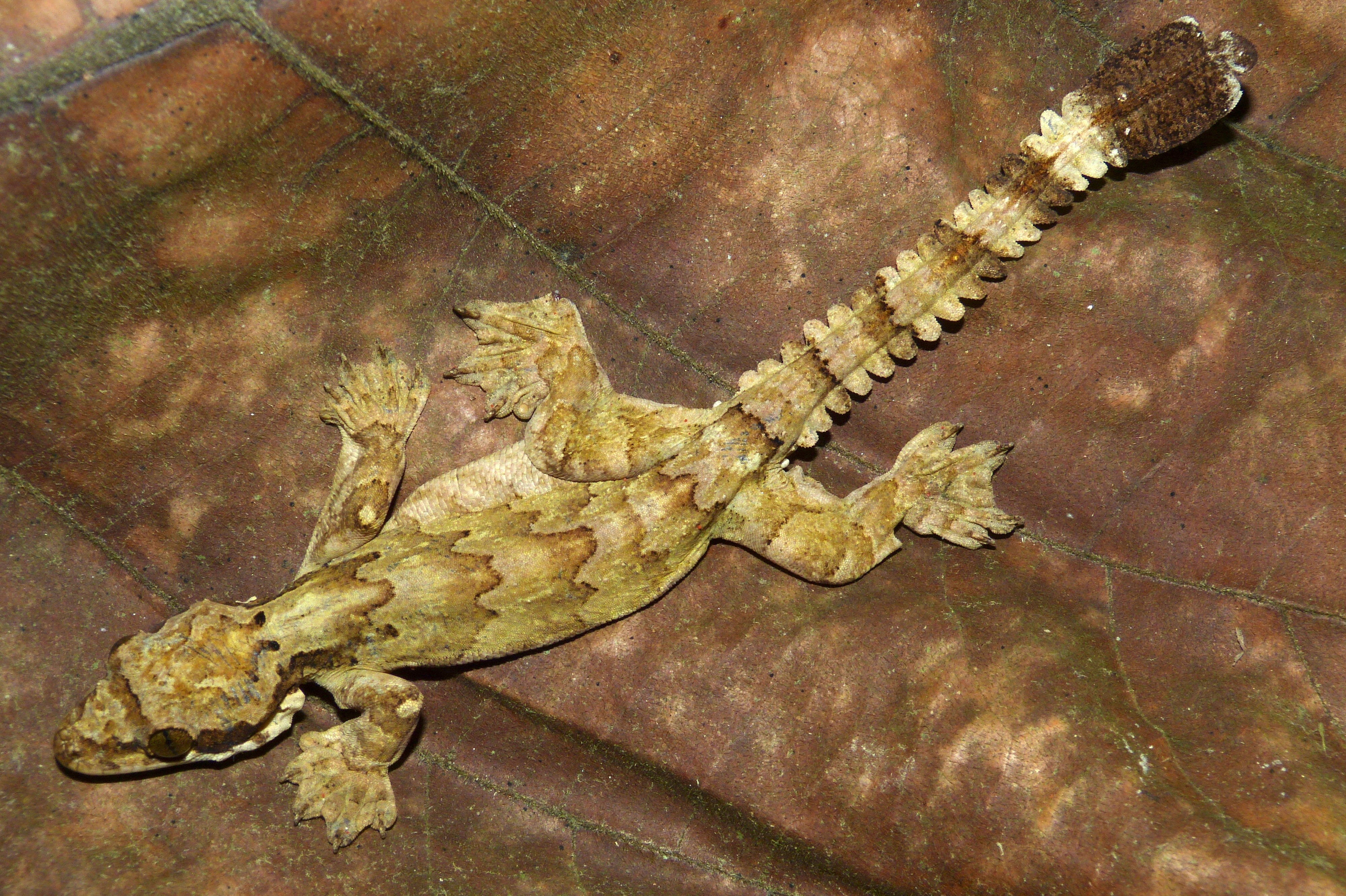 Tapah Hills, Perak, MALAYSIA